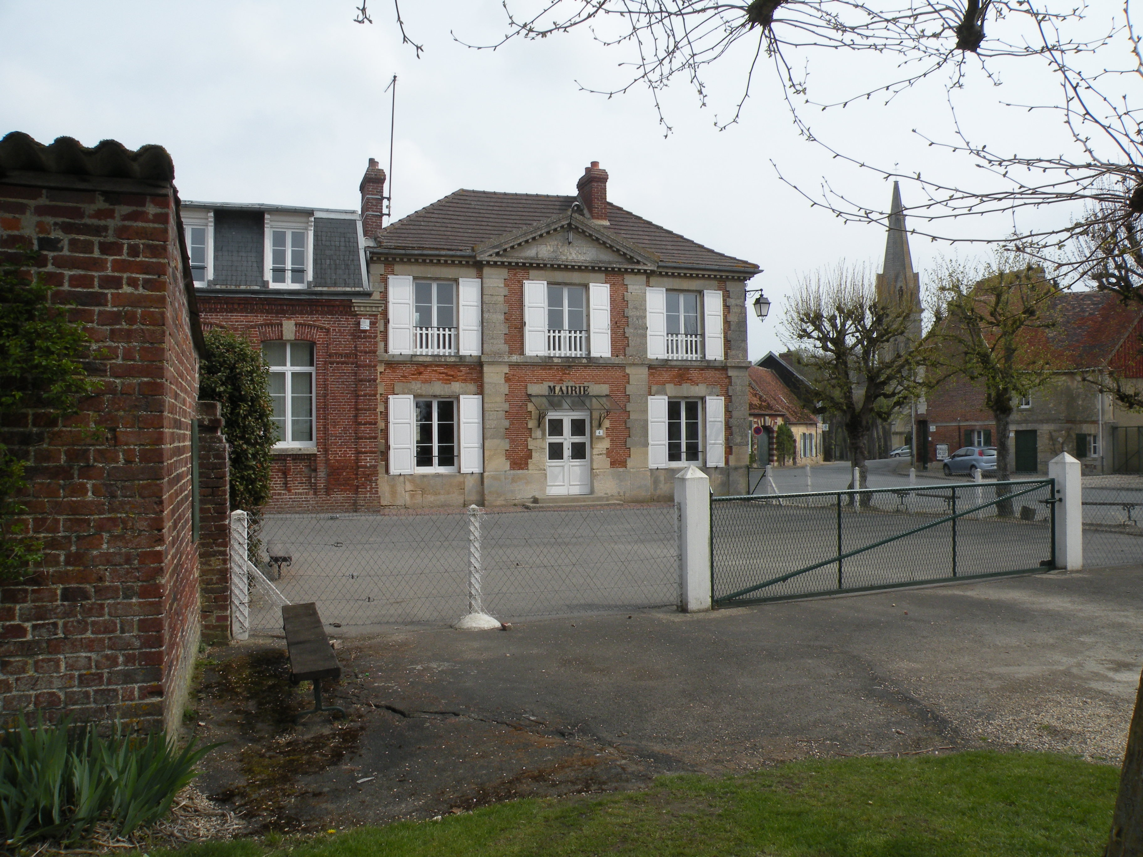 mairie Mouchy-le-Châtel